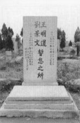 中文（中国大陆）: 王明道、刘景文墓碑